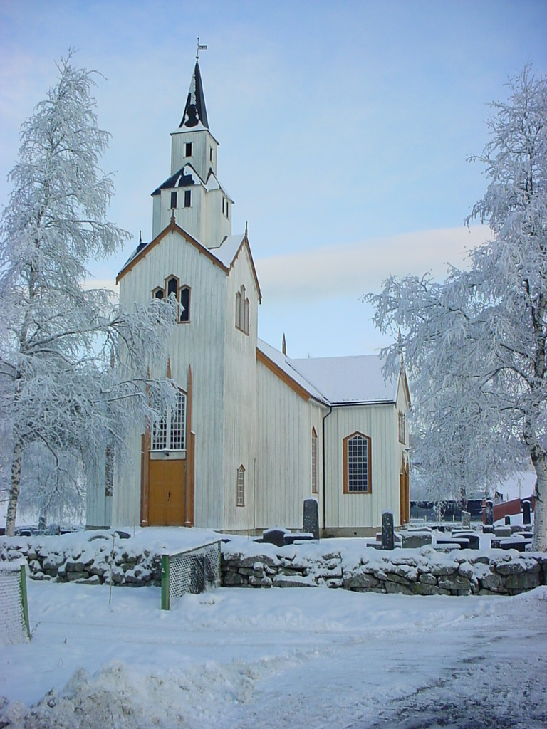 Sauland Kirke Hjartdal Telemark Norway